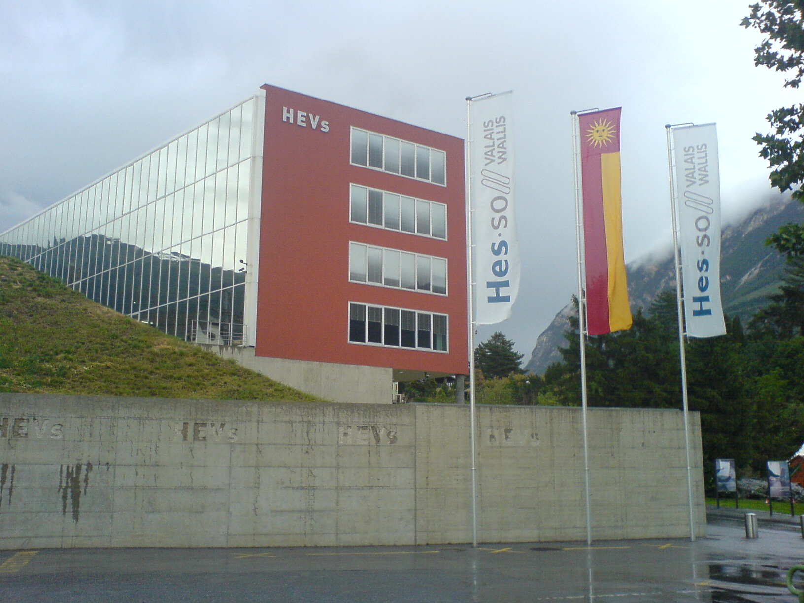 HES-SO Valais, Sierre, Switzerland